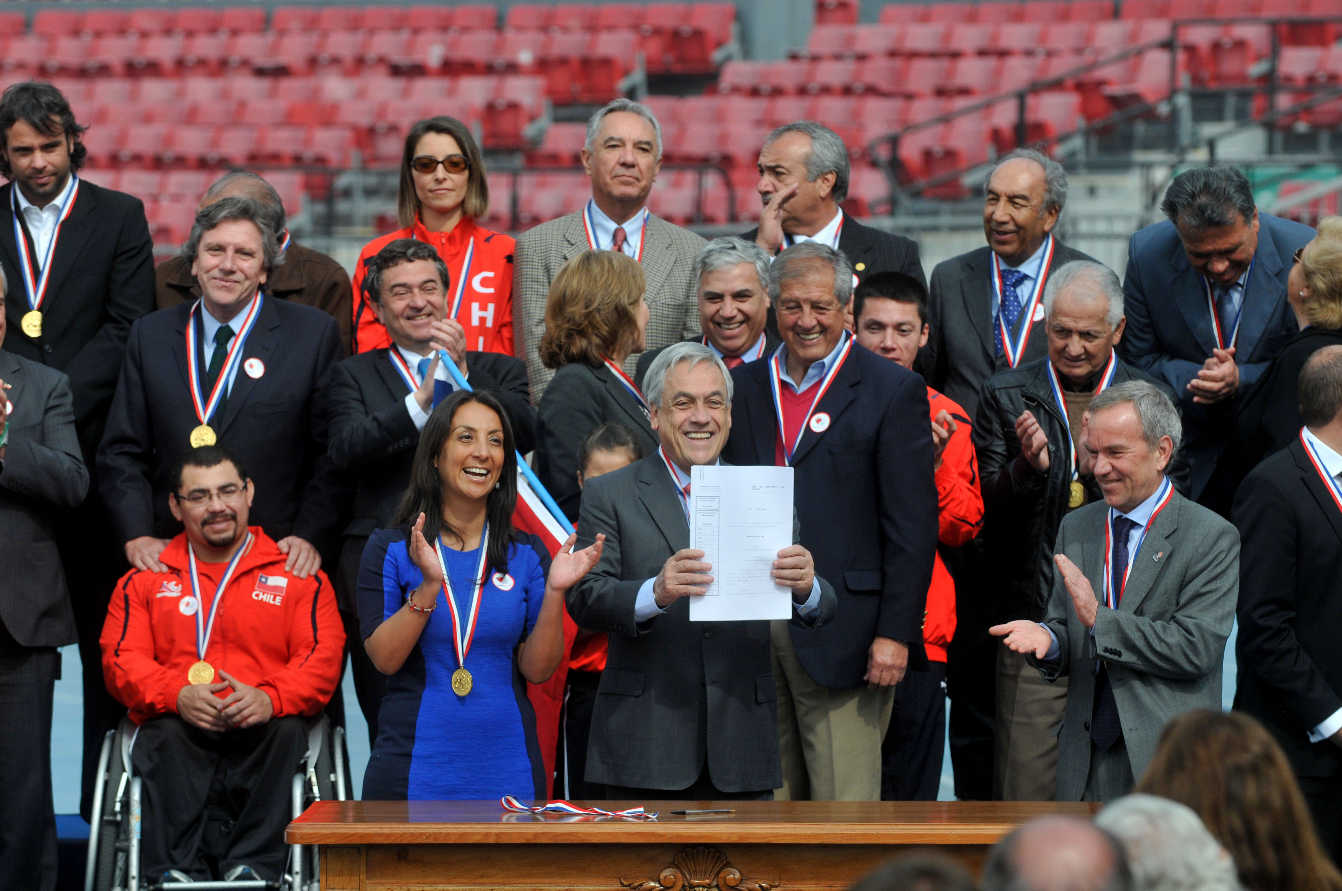 Promulgación de la ley de Ministerio del Deporte de Chile.